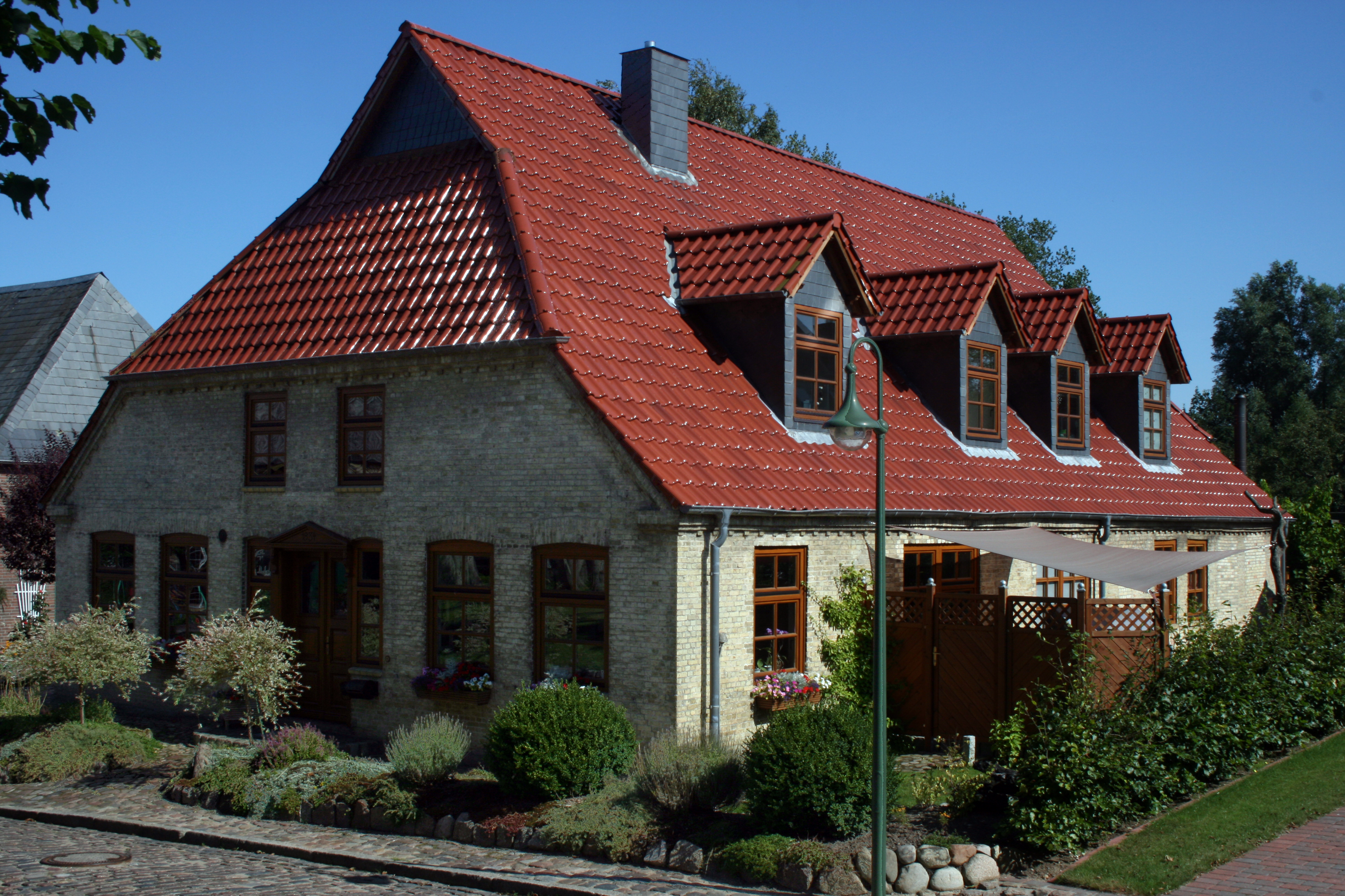 Haus mit Niedersachsengiebel in Tellingstedt, Dithmarschen,Schleswig-Holstein